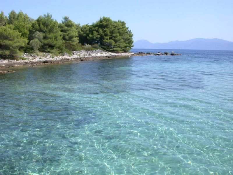 Perna